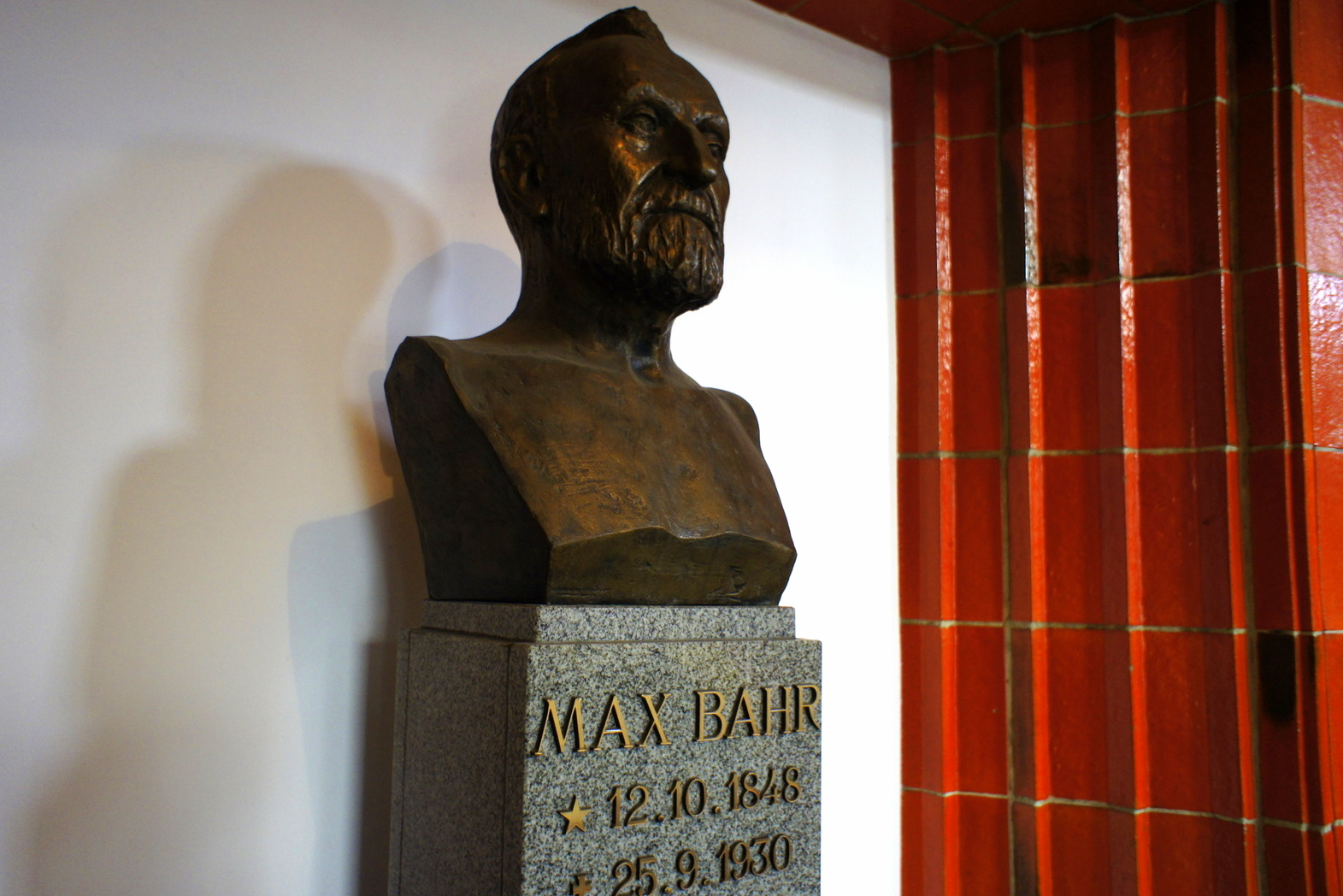 Popiersie fabrykanta i społecznika Maxa Bahra, eksponowane w hallu Łaźni Miejskiej, której budowę zainicjował w Landsbergu nad Wartą, dziś Gorzowie Wlkp. (rekonstrukcja poznańskiego rzeźbiarza Jerzego Sobocińskiego)